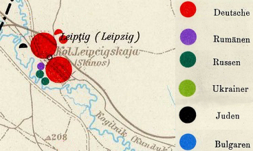 Landkarte mit ethnischen Gruppen in Leipzig nach der rumänischen Volkszählung von 1930, hier 2150 Deutsche, 100 Russen, 50 Juden, 50 Rumänen